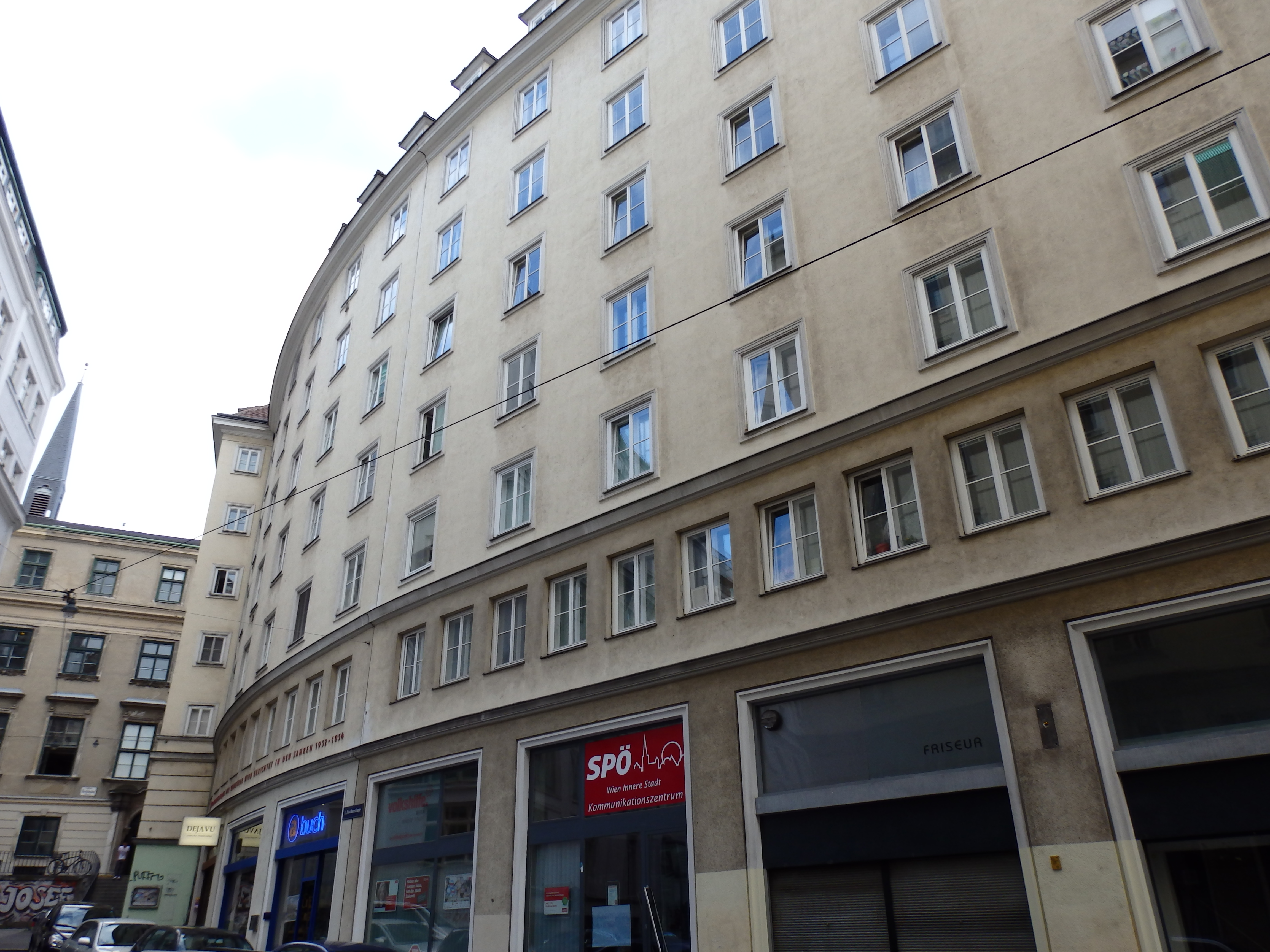 Gemeindebau (1952-1954) von Otto Niedermoser und Hans Petermair, Fischerstiege 1-7, Wien-Innere Stadt